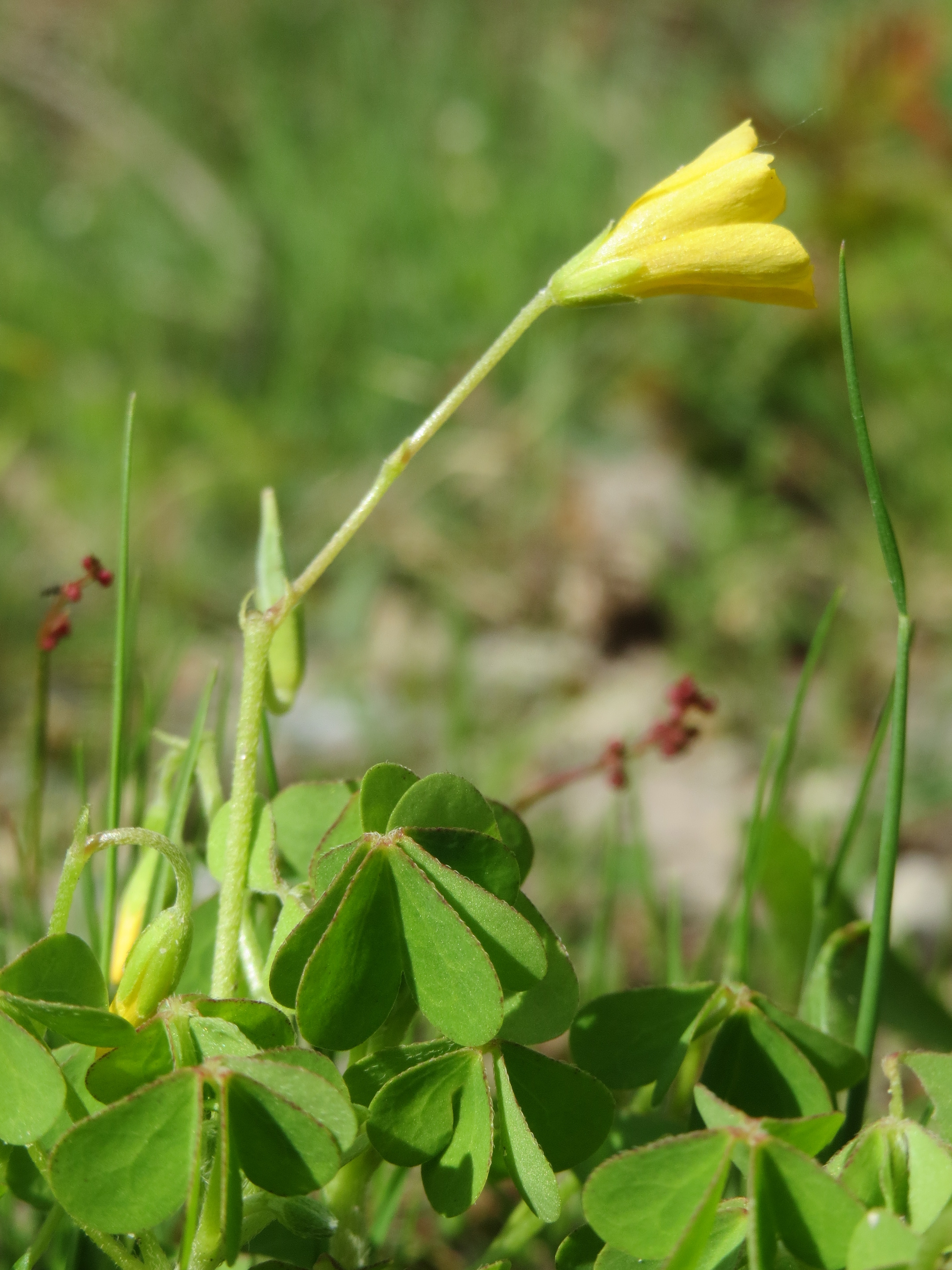 Aufrechter Sauerklee (Oxalis stricta) in der Schwetzinger Hardt